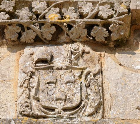 Armoiries du Fécamp en bas-relief au Prieuré Saint Gabriel à Saint-Gabriel-Brecy dans le Calvados